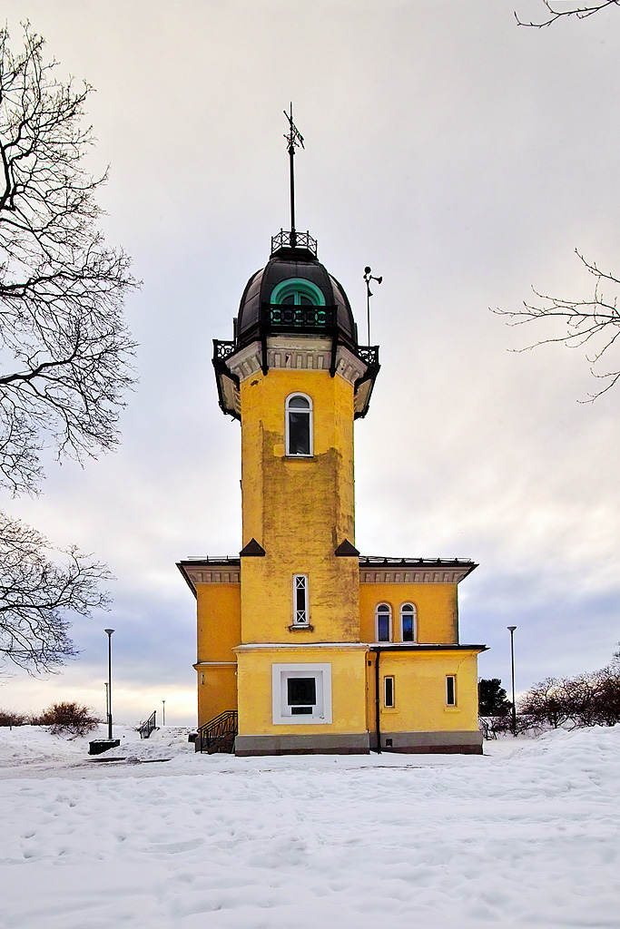 Location: St. Hans Haugen, Oslo